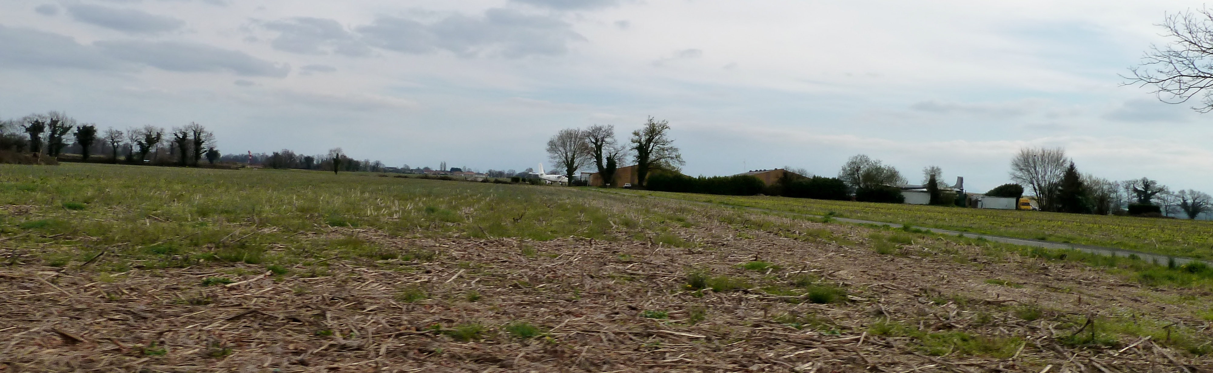 Aérodrome de Lasclaveries